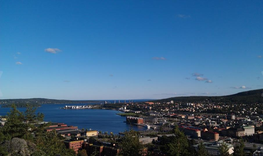 Utsikt från Norra berget, Sundsvall.